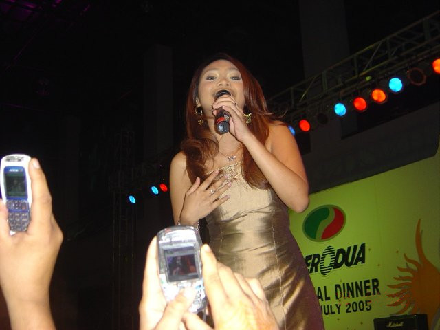 Dayang Nurfaizah tengok perform masa company annual dinner 2005.